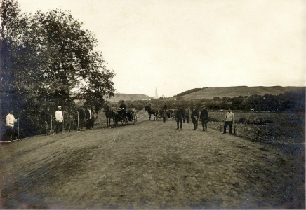 Российская империя. Бузулук. Спасо-Преображенский монастырь.